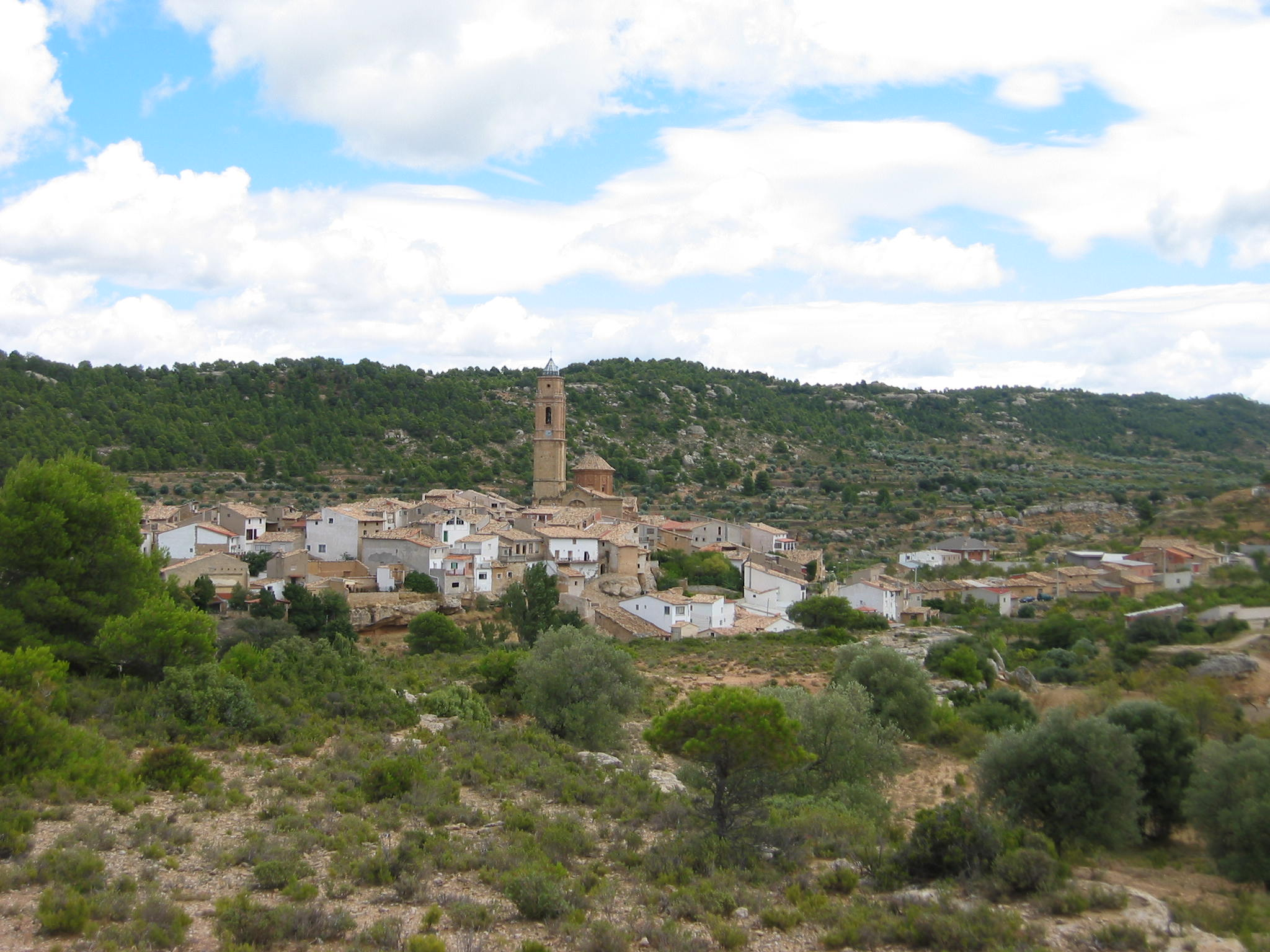 Vista panorámica de Belmonte de San José - Teruel